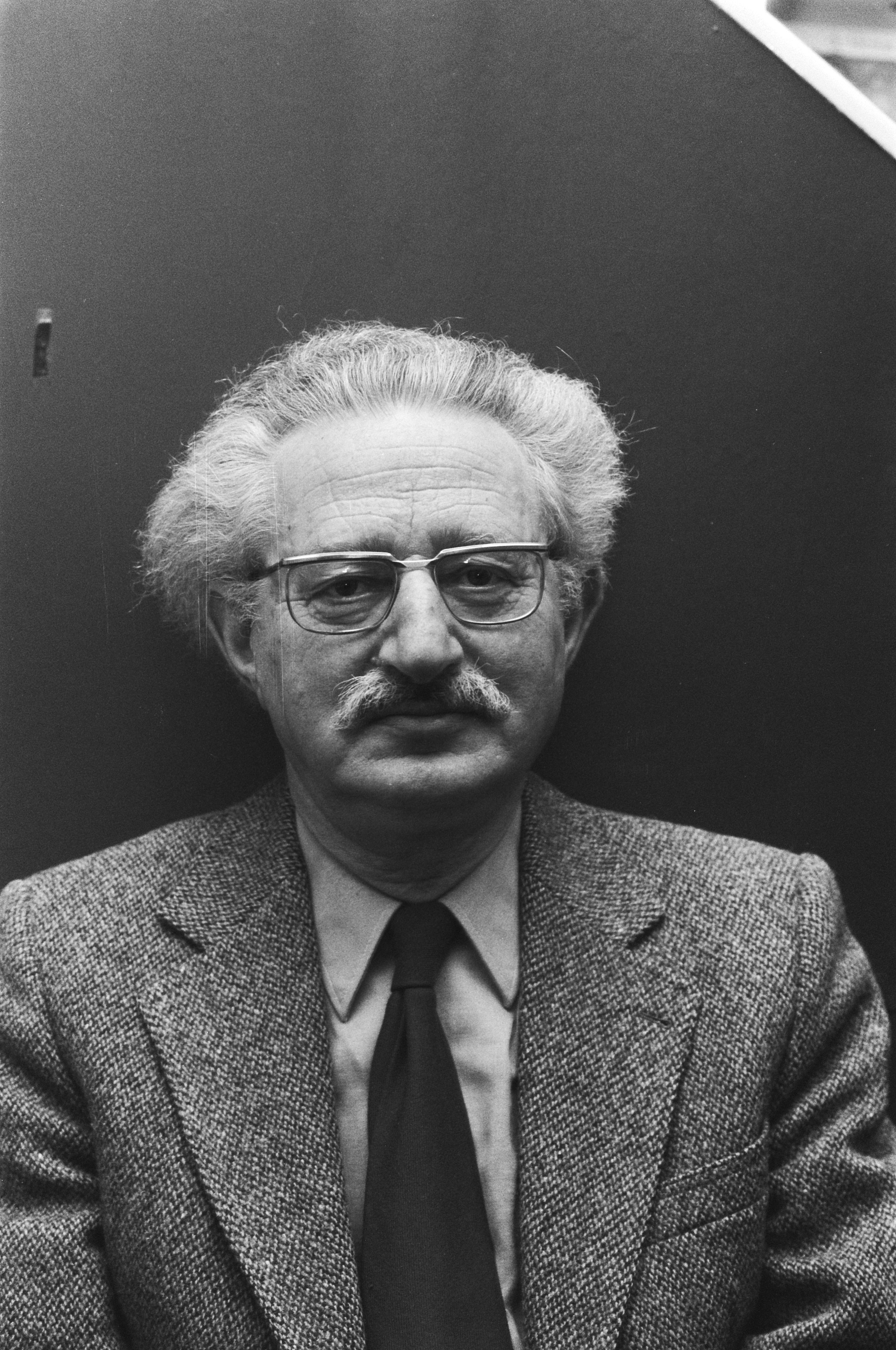 Collectie / Archief : Fotocollectie Anefo Reportage / Serie : [ onbekend ] Beschrijving : Dichters ontmoeten lezers in boekwinkel in Amsterdam; Maurits Mok , koppen Datum : 2 maart 1976 Locatie : Amsterdam, Noord-Holland Trefwoorden : DICHTERS, boekhandels Fotograaf : Bogaerts, Rob / Anefo Auteursrechthebbende : Nationaal Archief Materiaalsoort : Negatief (zwart/wit) Nummer archiefinventaris : bekijk toegang 2.24.01.05 Bestanddeelnummer : 928-4439